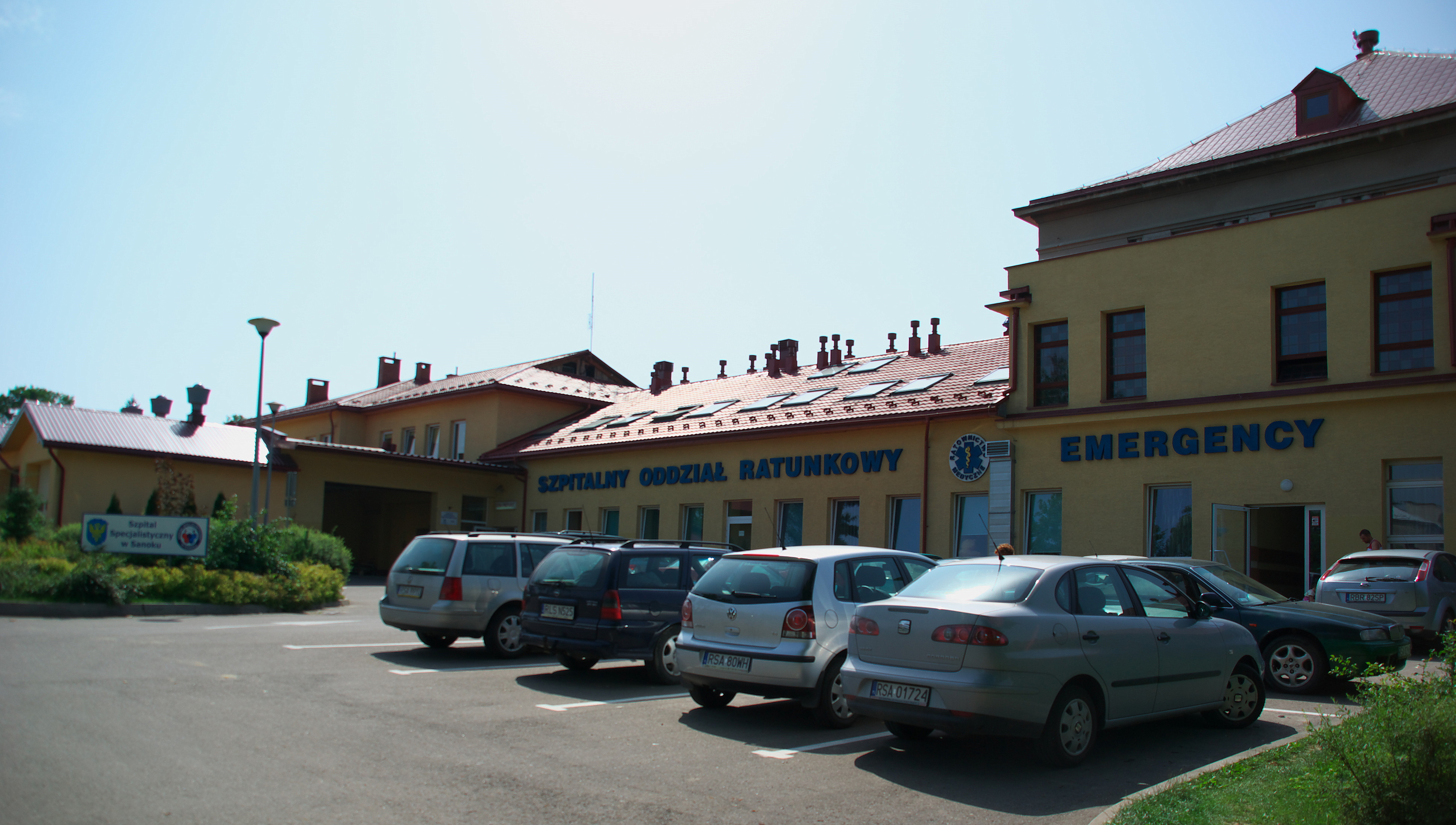 SOR Sanok (Szpitalny oddział ratunkowy) Emergency department, 800-lecia street